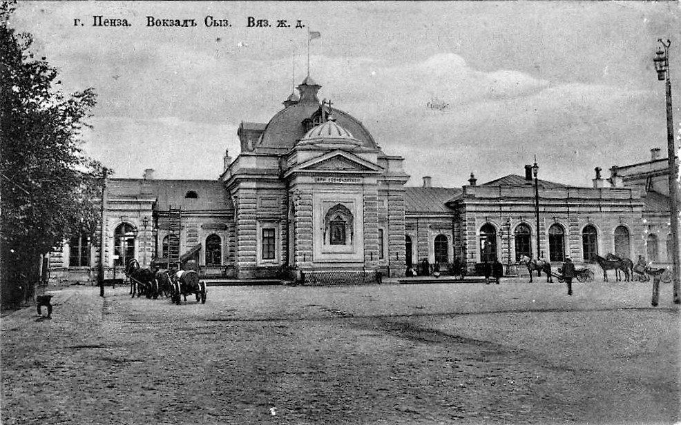 Вокзал станции Пенза Сызрано-Вяземской ж. д.